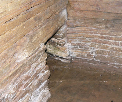 Cuween Hill (Orkney), entrance from inside